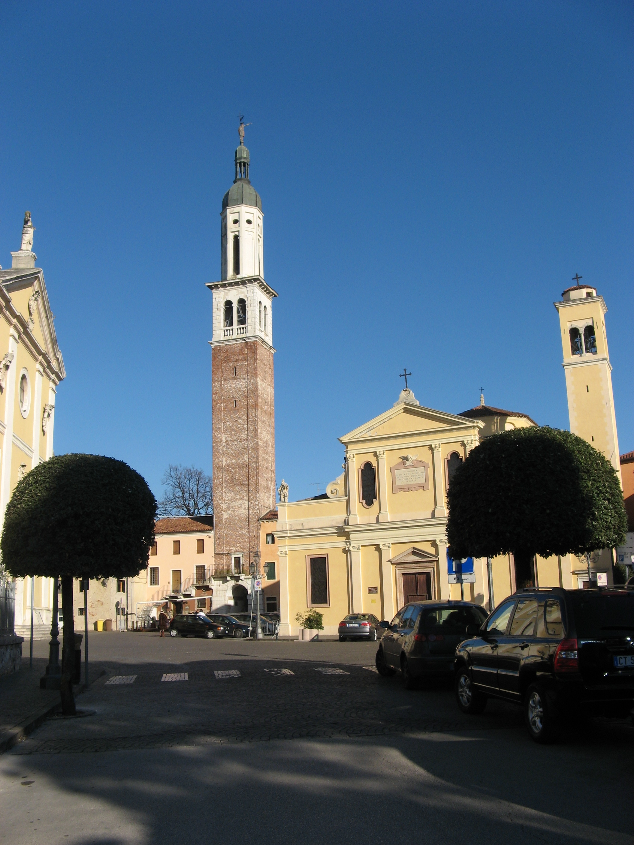 Thiene (Vicenza), chiesa e campanile.